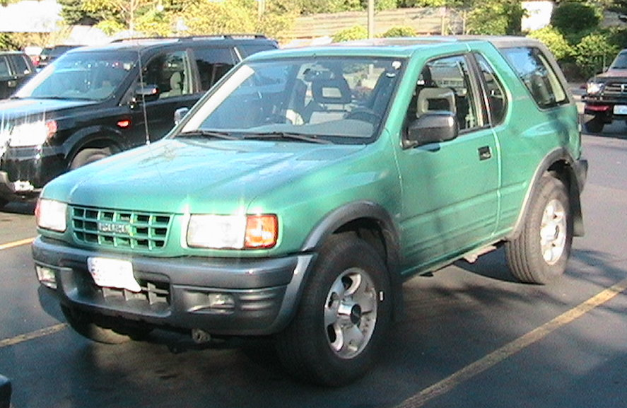 Arthur Hu Kirkland WA Isuzu Amigo